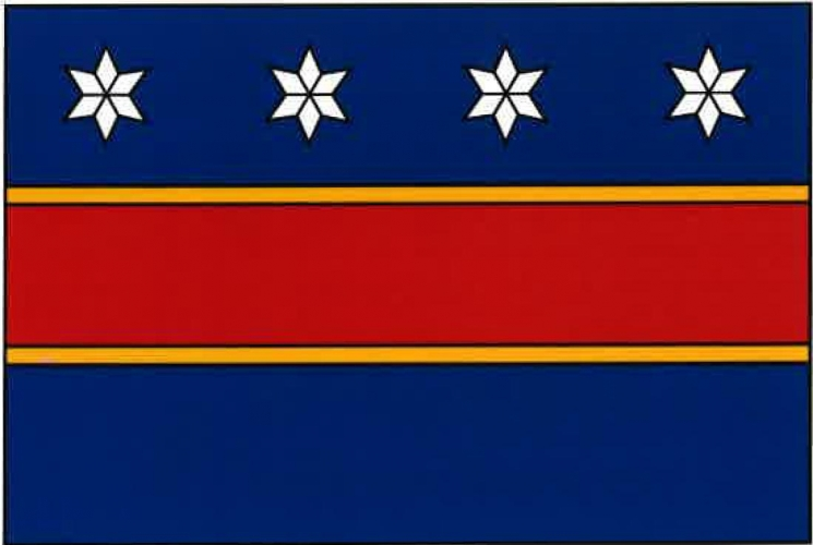 vlajka, Stružná, okres Karlovy Vary